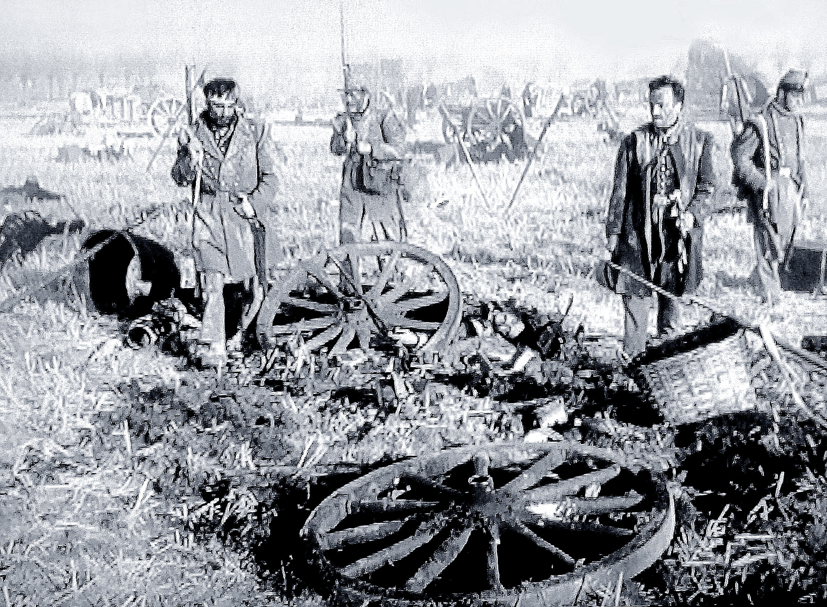 il campo della sconfitta di Novara - 1849 - ne "La pattuglia sperduta" (Nelli, 1954)